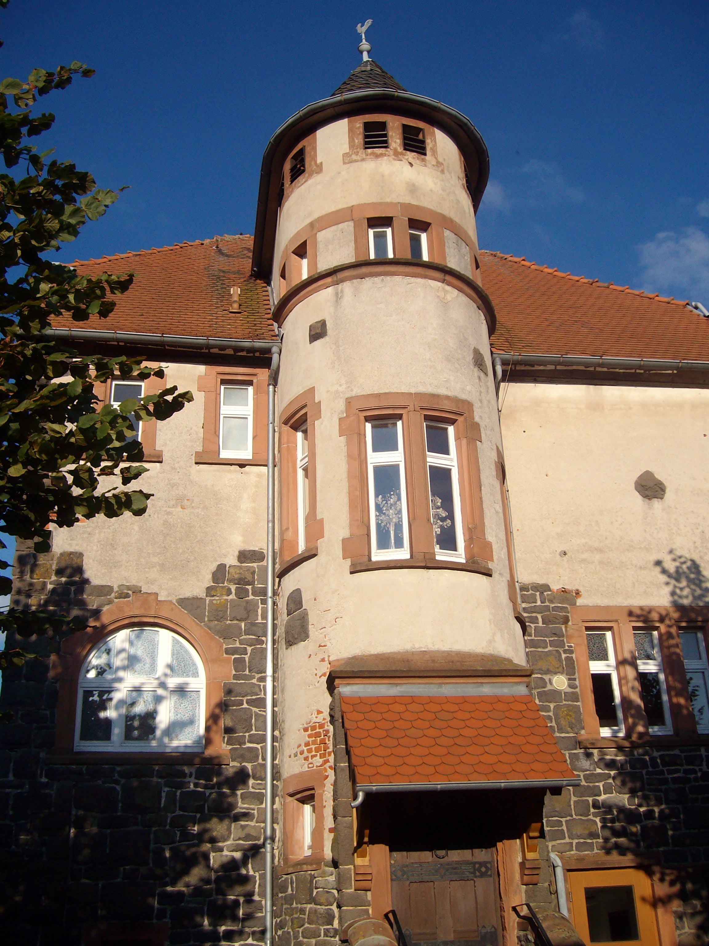 Treppenturm der Evangelischen Kirche Altenhain, Laubach, Landkreis Gießen, Hessen, Deutschland